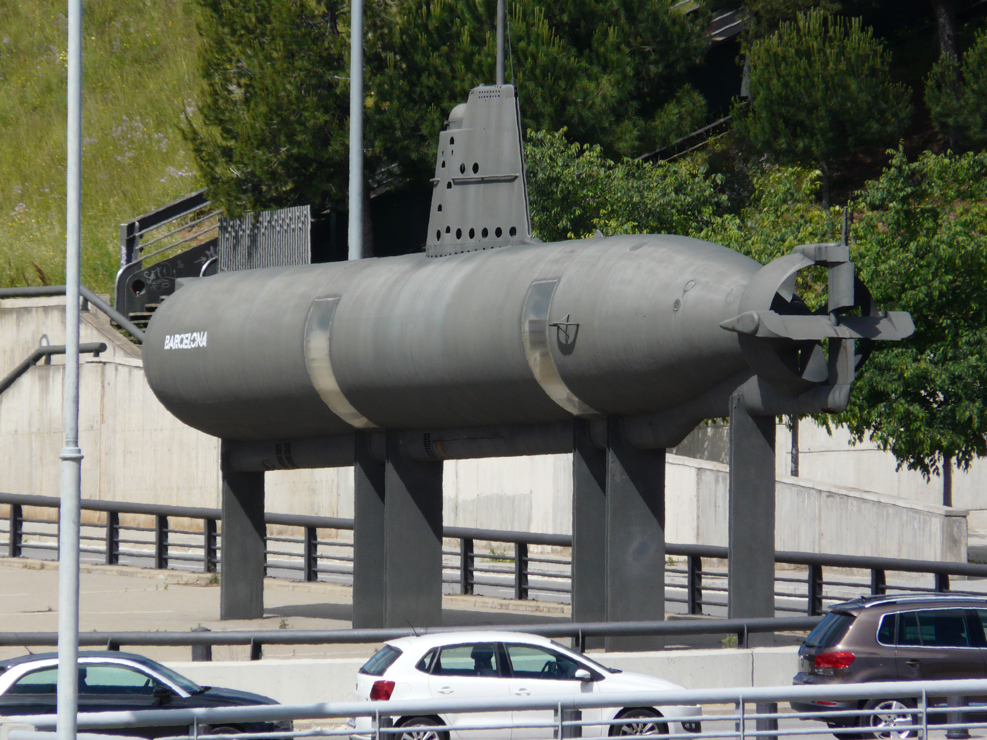 El submarí Barcelona. Museu de la Ciència (Barcelona). Material: submarí SA-51. Construït entre 1954 i 1964, en aquest emplaçament des de 1986. 2″ N, 2° 07′ 55.52″ E